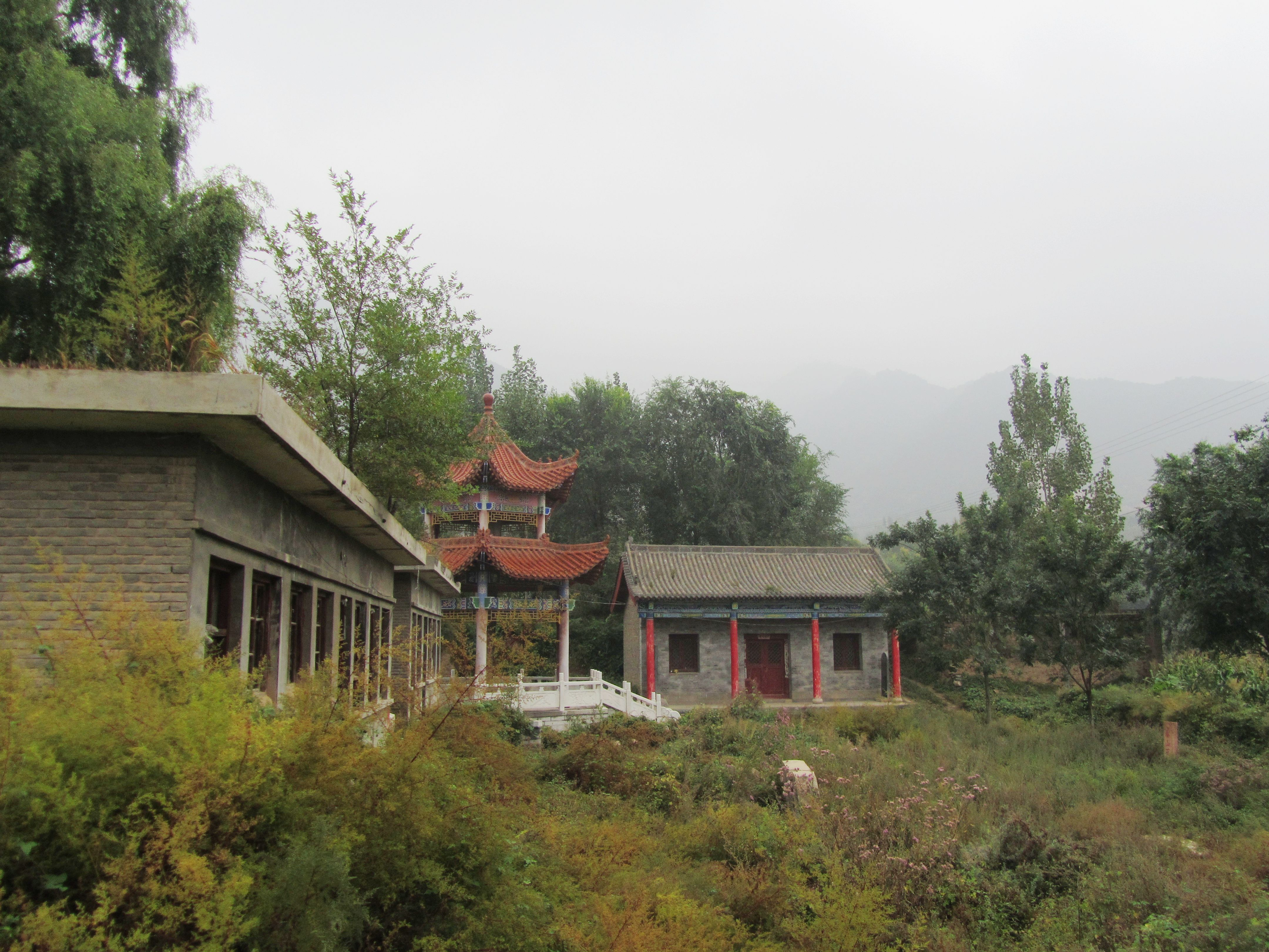 山西临汾市洪洞县霍山，中镇庙残址。